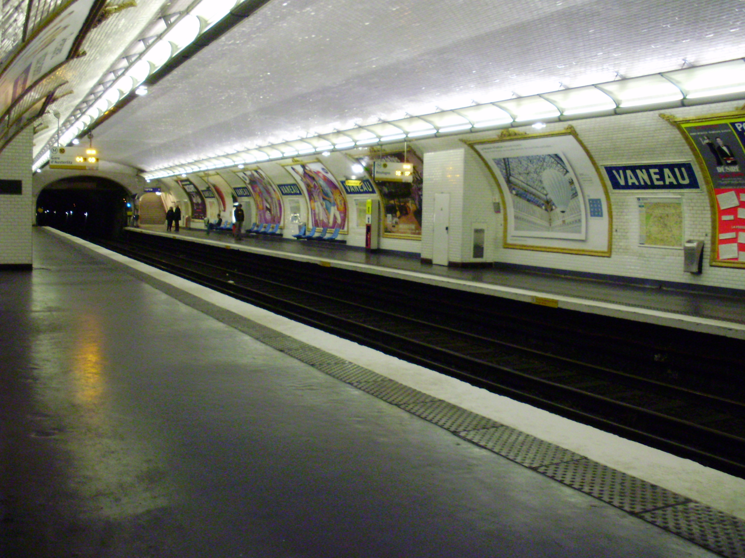 Quais de la station Vaneau du métro de Paris